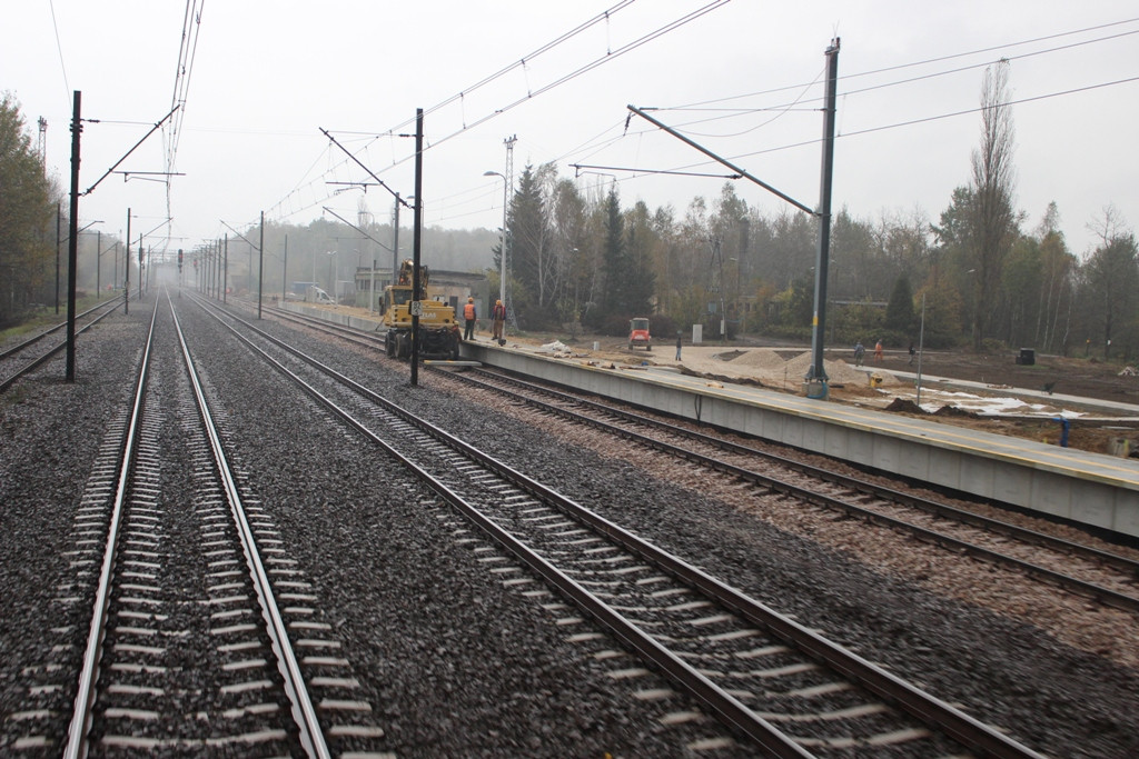 budowany peron przy stacji kolejowej Opoczno Południowe.